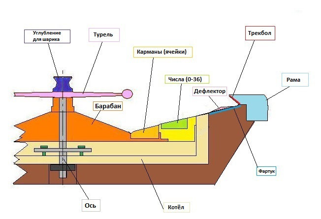 Колесо рулетки (русская версия с французской фотографии)